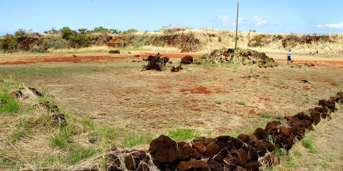 Иллюстрация для викиучебника Гавайеведение